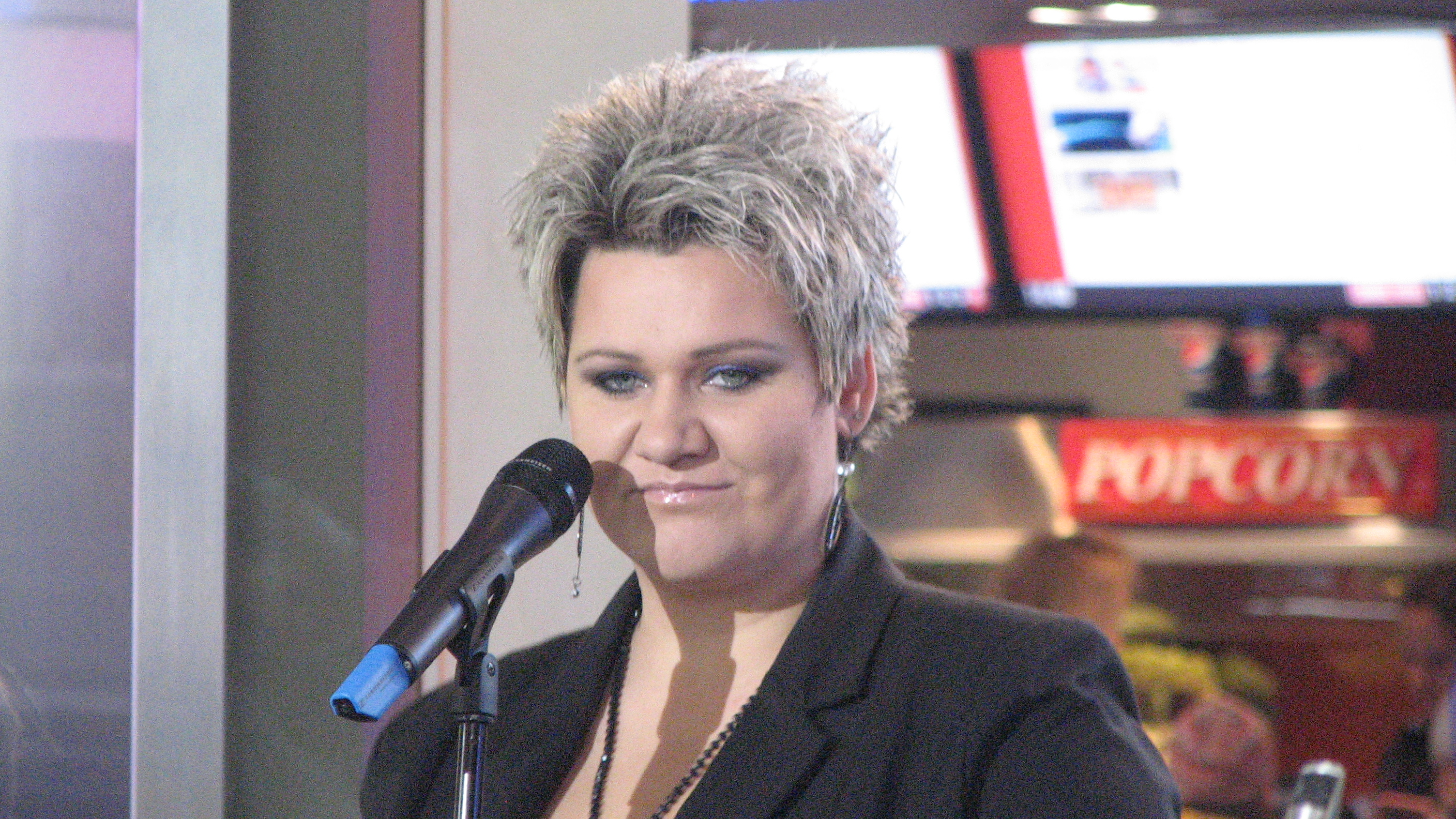 Dagmar Oja "Ringvaate Eesti Laulu" salvestusel Liis Lemsalu taustalauljana